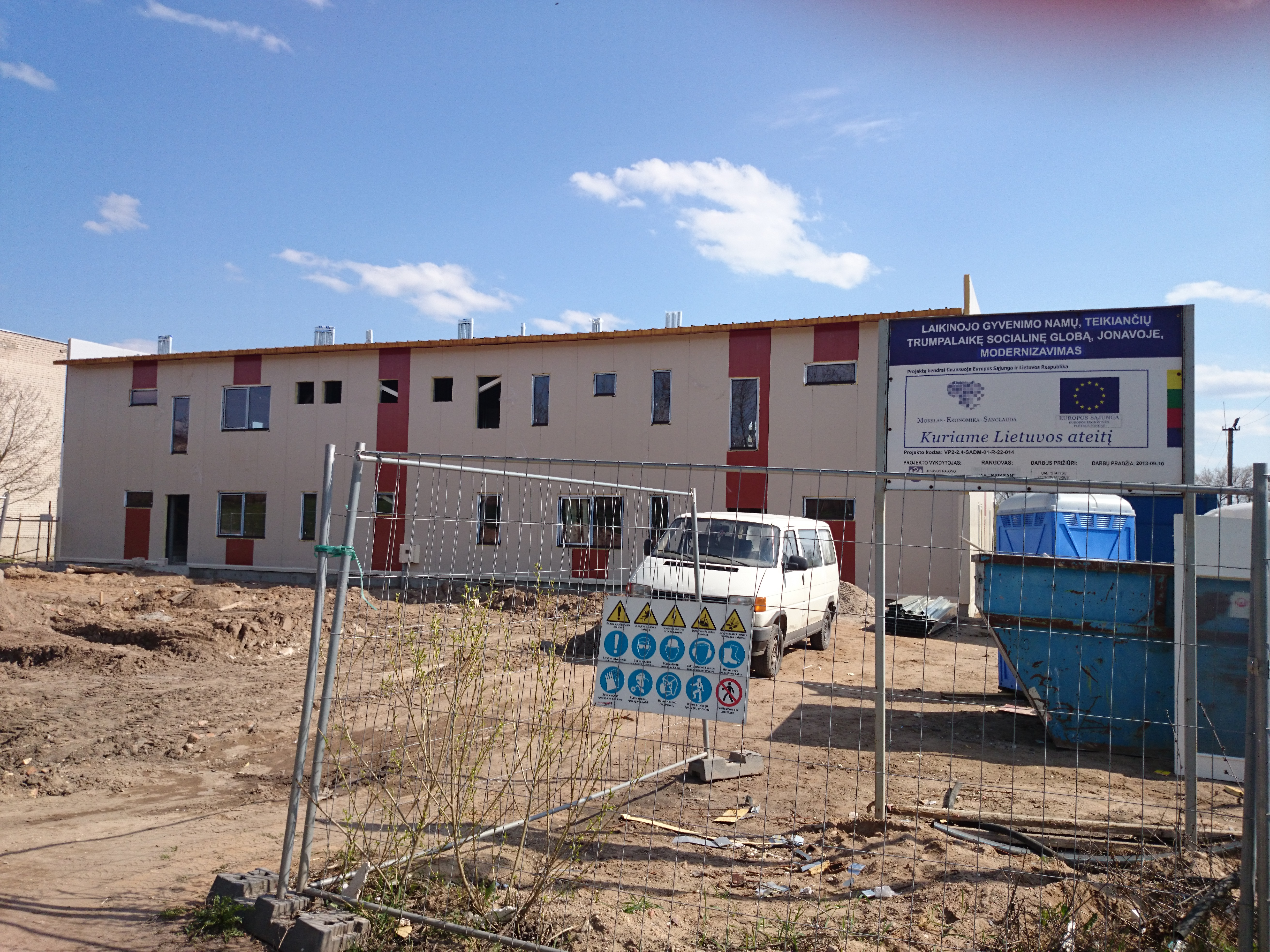 Girelė (Jonava)